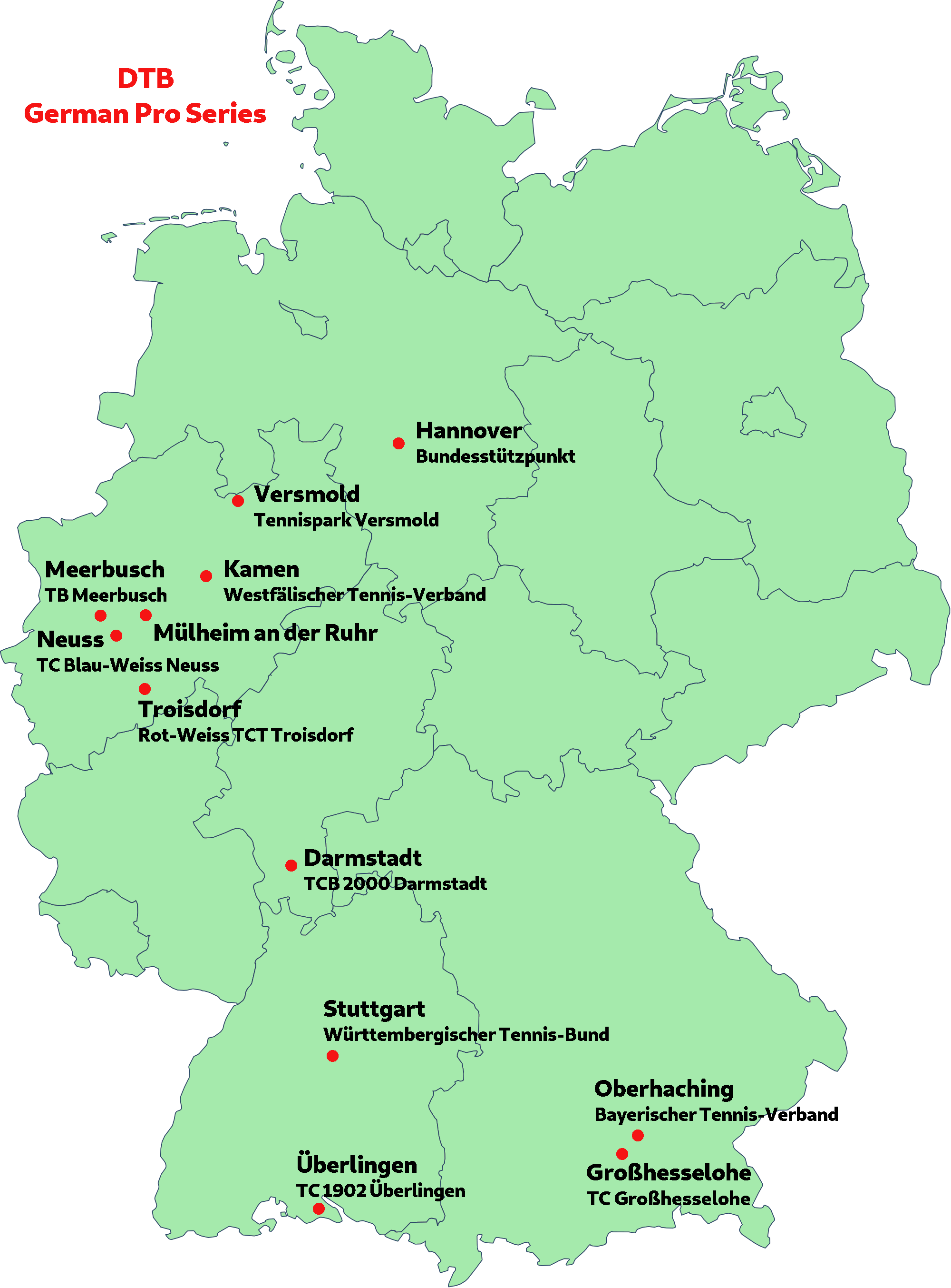 Karte der DTB German Pro Series 2020